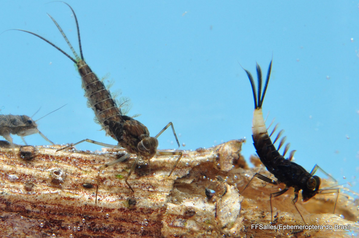 Ninfas dos gêneros Callibaetis e Cloeodes (Baetidae) sobre o substrato subaquático